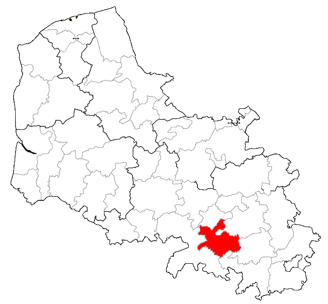 Localisation de la CCVV dans le Pas-de-Calais.